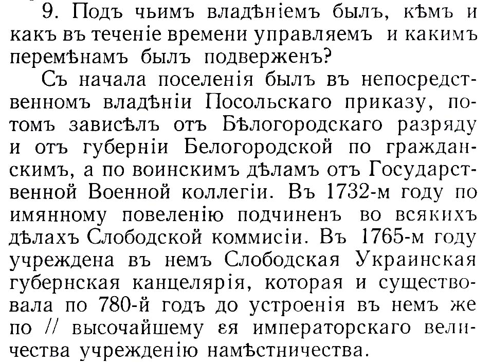 Ответ на девятый вопрос правительственной анкеты про подчинение города Харькова ("Под чьим началом был") в "Топографическом описании Харьковскому наместничеству" 1785 года.